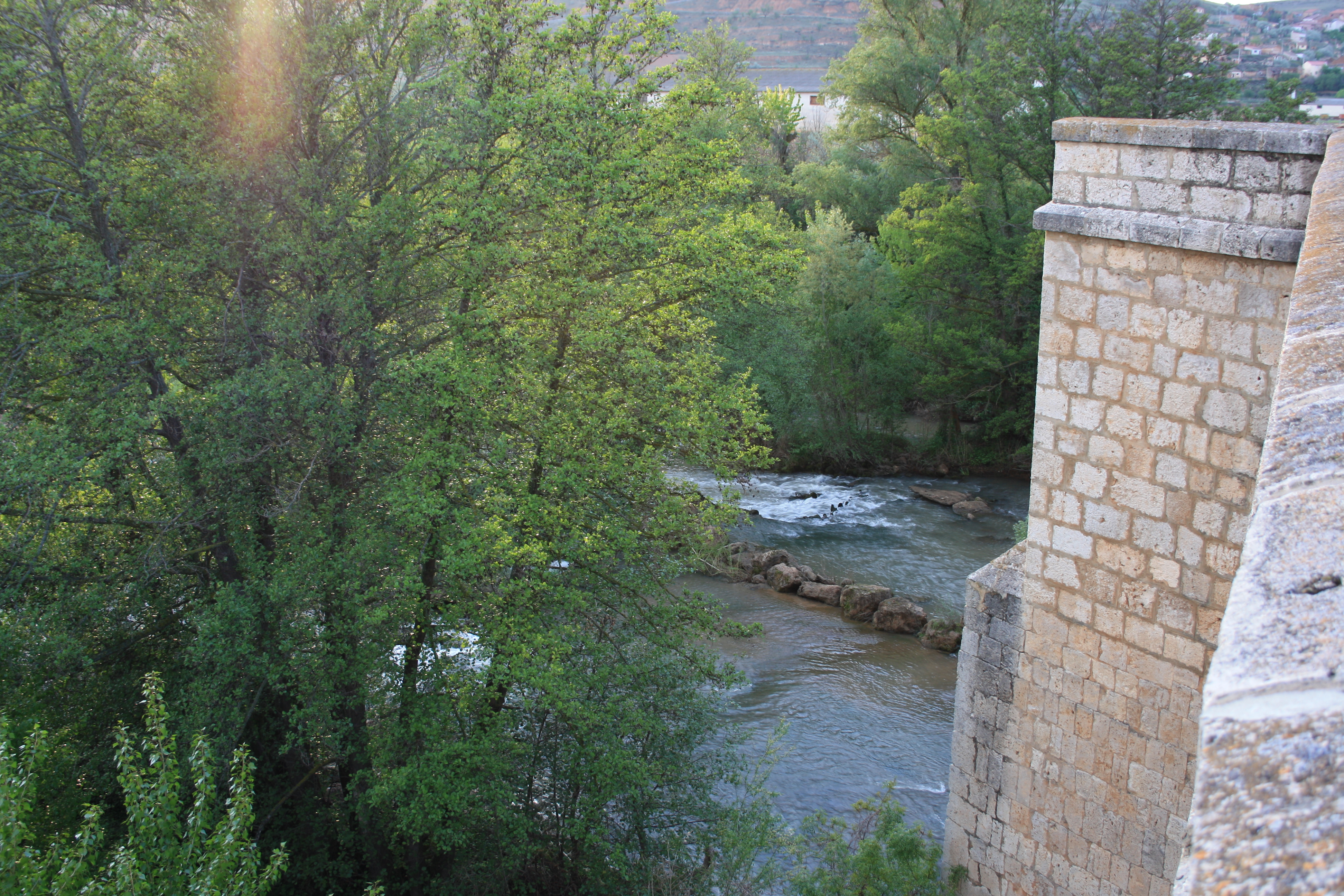 Es el puente medieval existente en San Martín de Rubiales, provincia de Burgos, ya que la anterior foto que subí alguien muy listo y aventajado la borró.